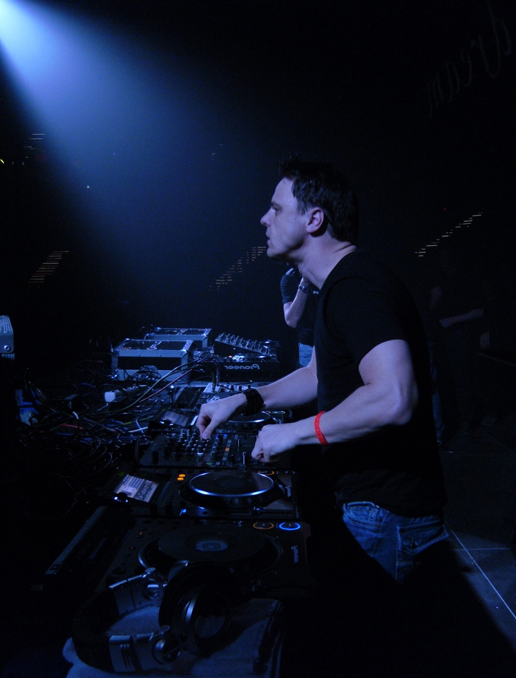 Zdjęcie zrobione podczas Mayday 2010 w katowickim spodku.